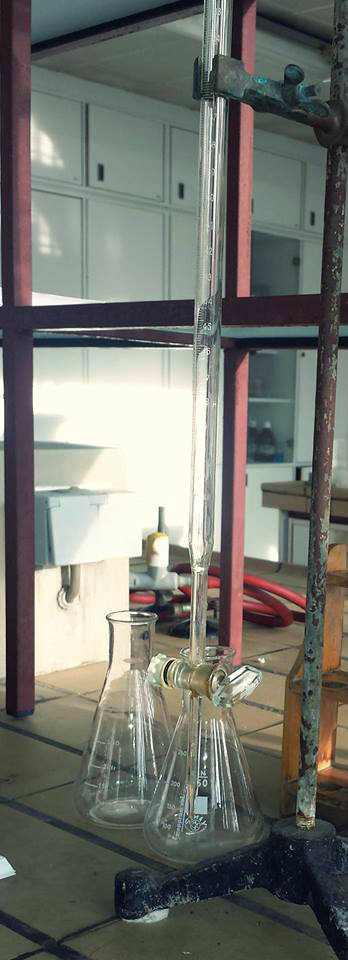 Prikazani su erlenmajeri i bireta koji predstavljaju aparaturu za titraciju.